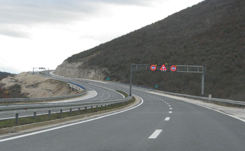 Atocesta A1